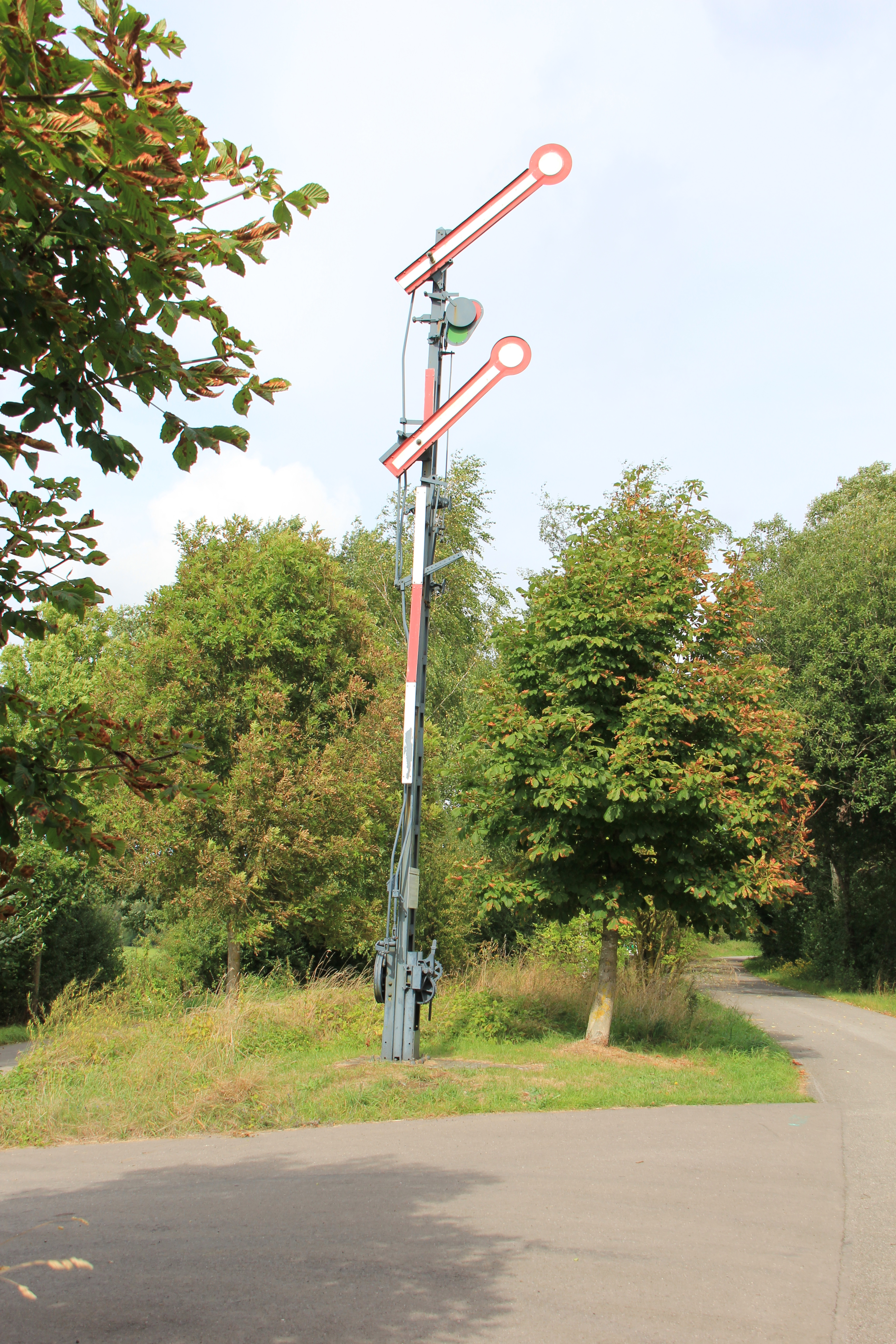 Den alen Diks zu Näerden op der Kräizung vun de Vëlospisten PC12 a PC17